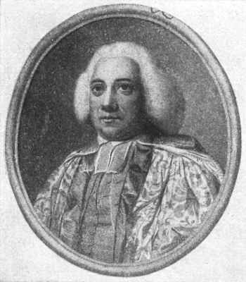 William Hayes, Stich auf der Erstausgabe von "The Passions"